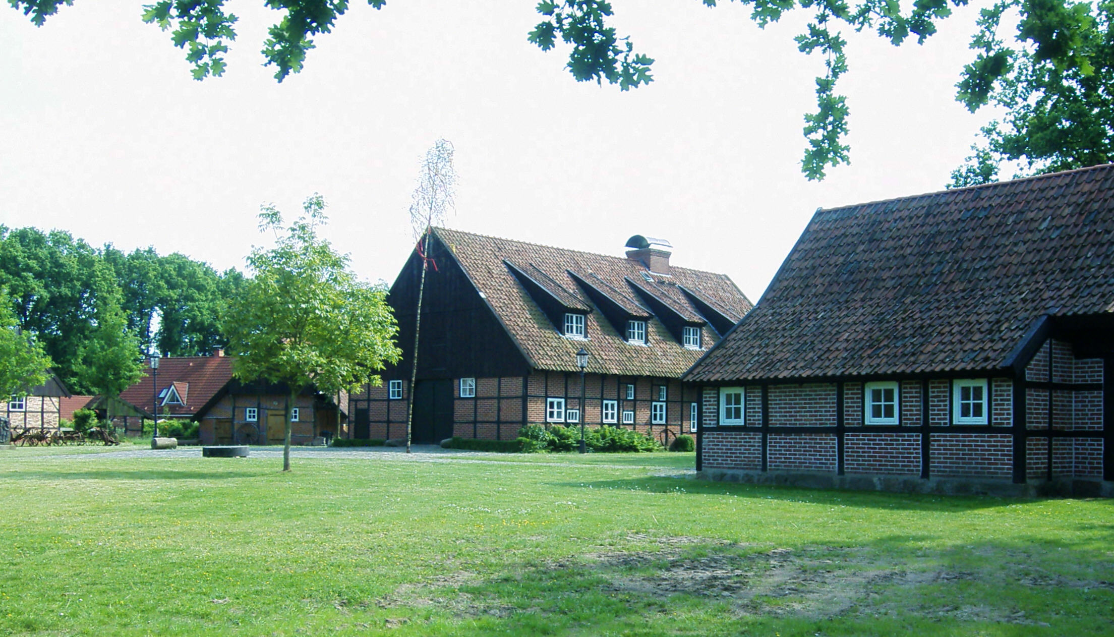 Heimathausanlage des Heimatverein Hauenhorst/Catenhorn